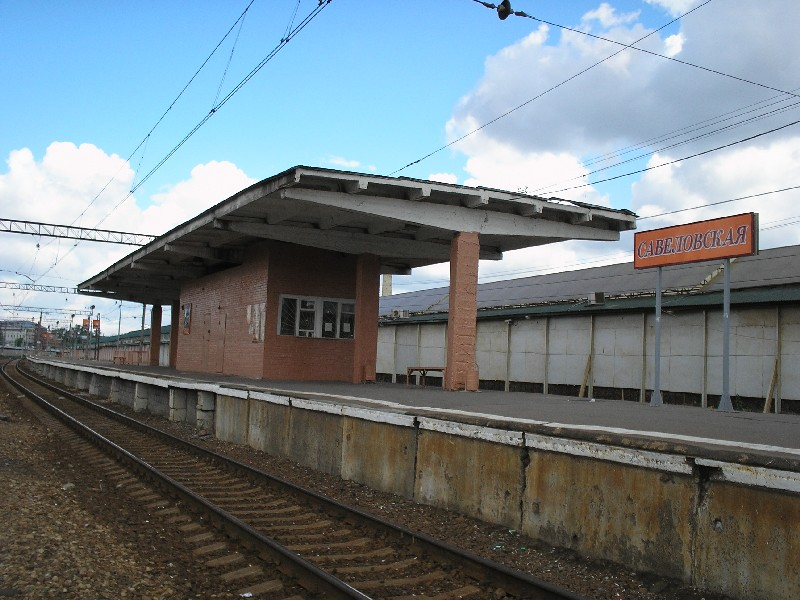 Savelovskaya Railplatform, Moscow